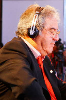 Sergio Campos, periodista chileno.